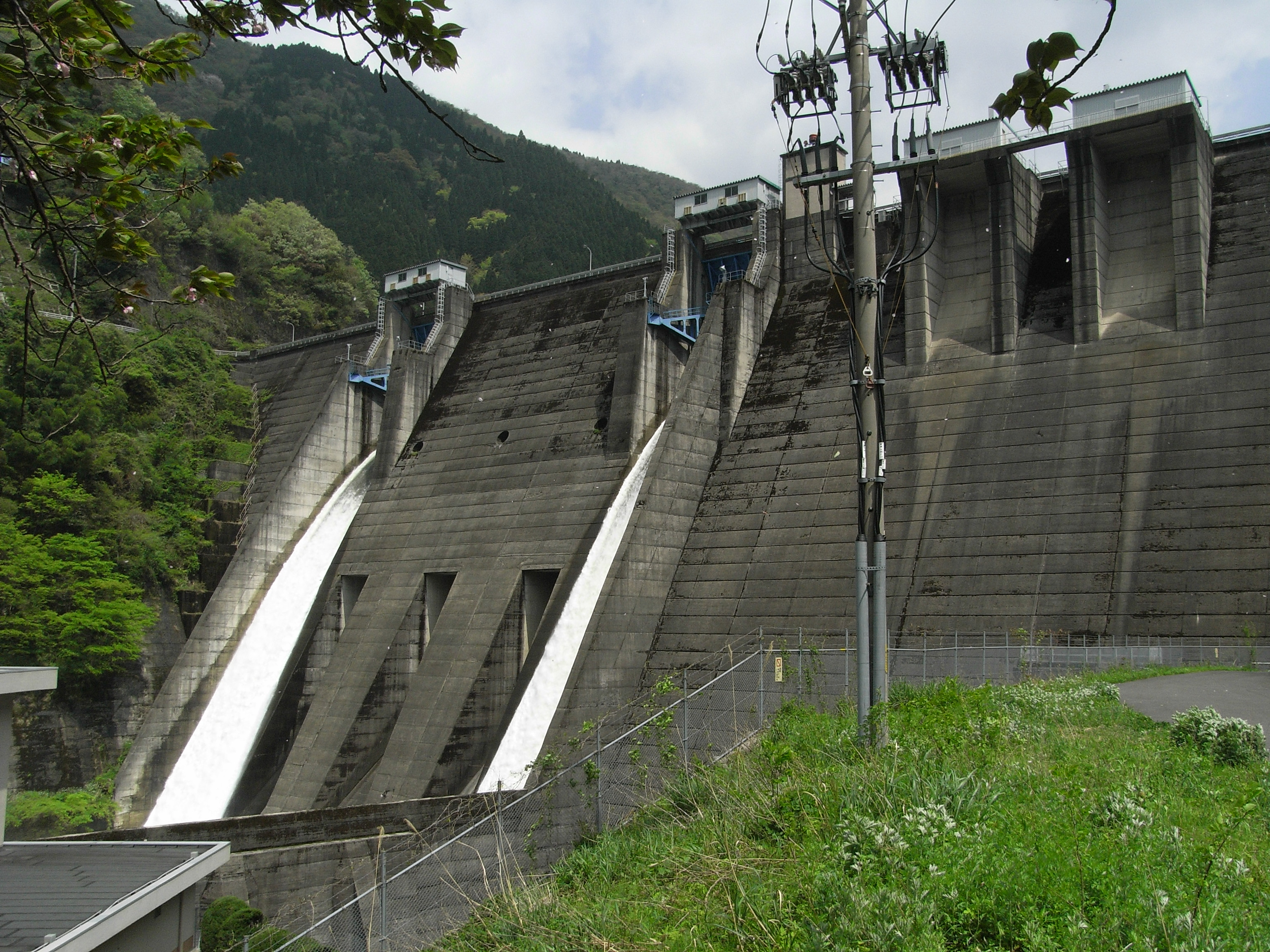 Dam